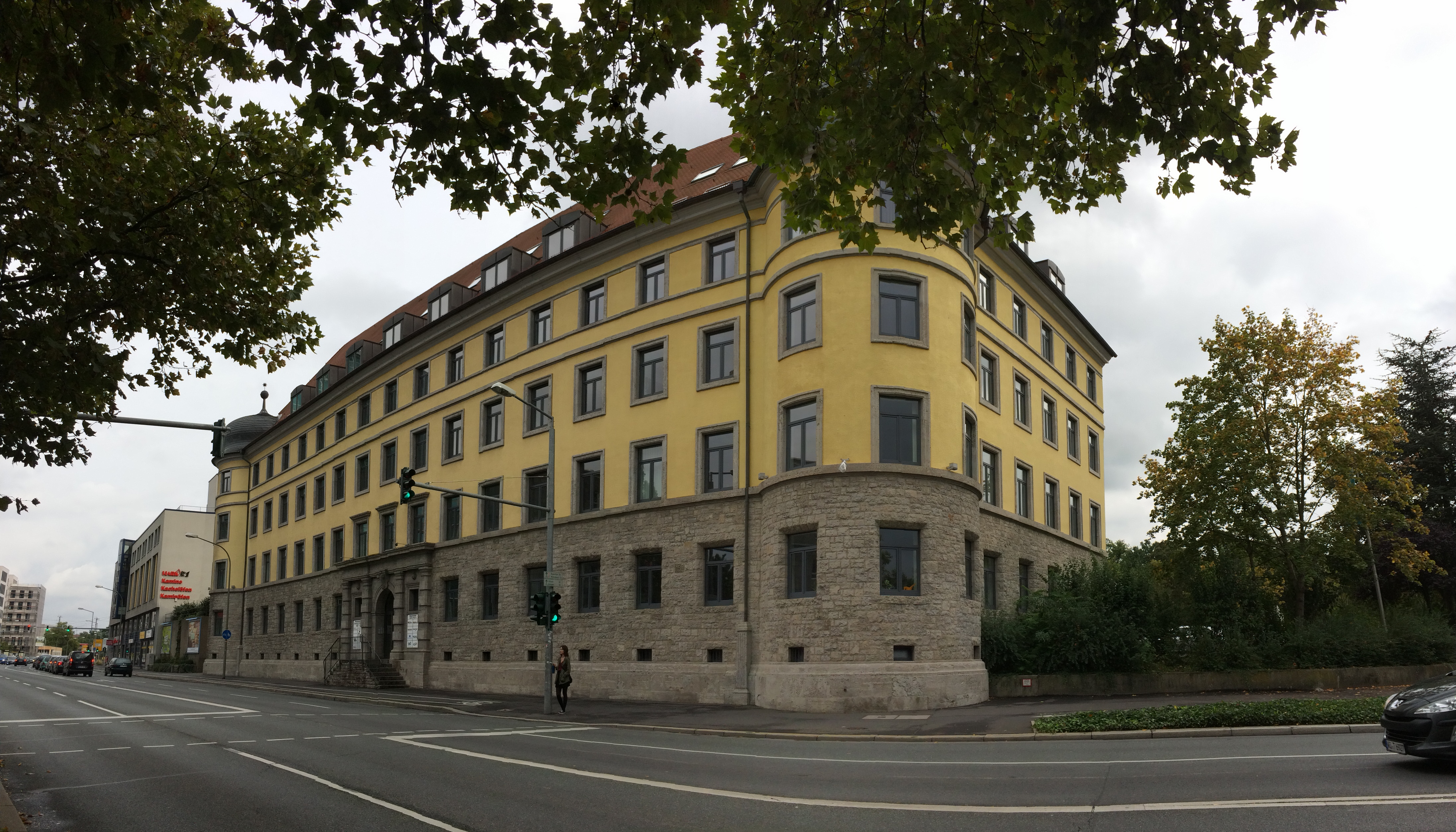 Würzburg, Ecke Berliner Platz 12/Schweinfurter Straße 2This is a photograph of an architectural monument.